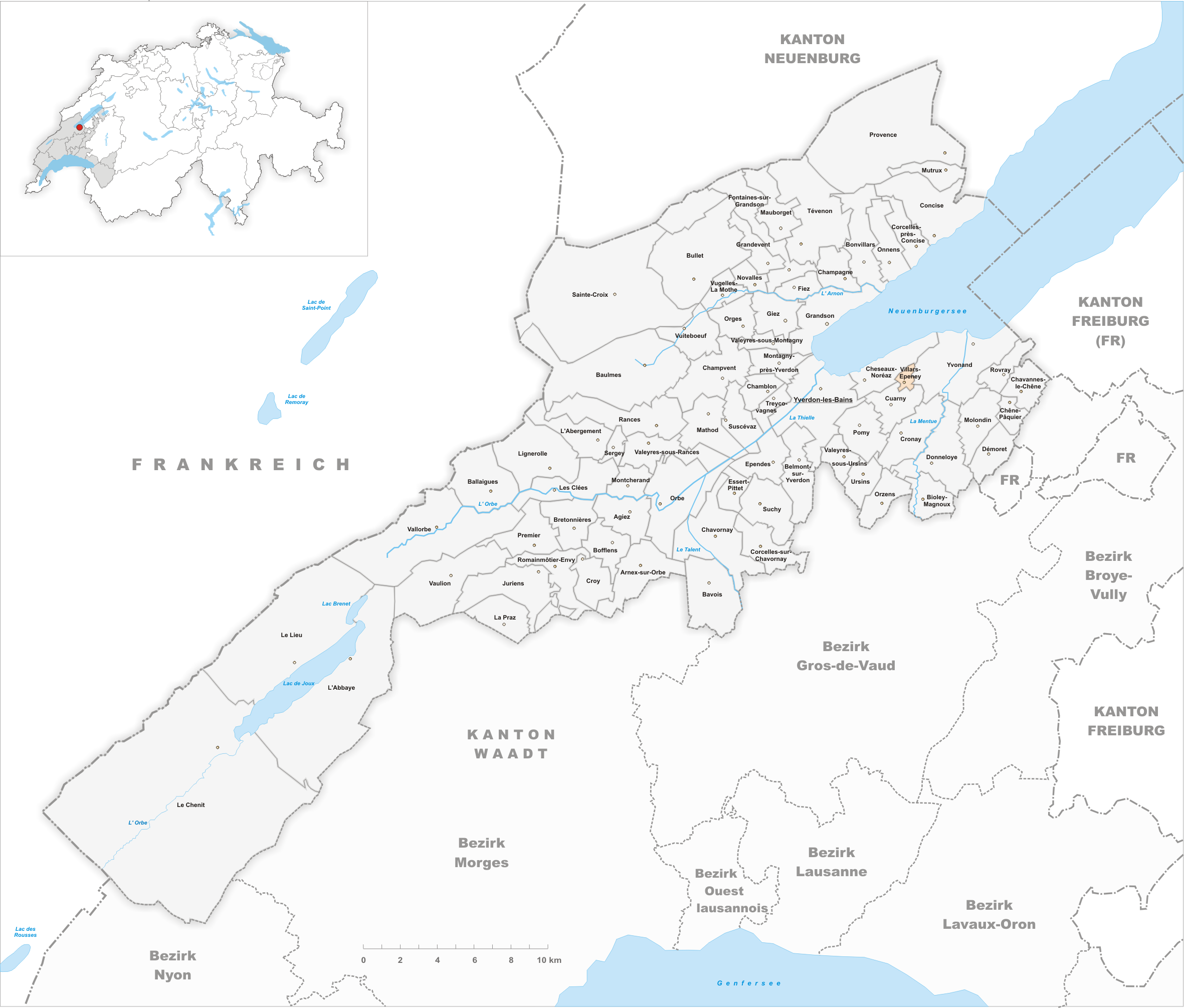 Municipality Villars-Epeney